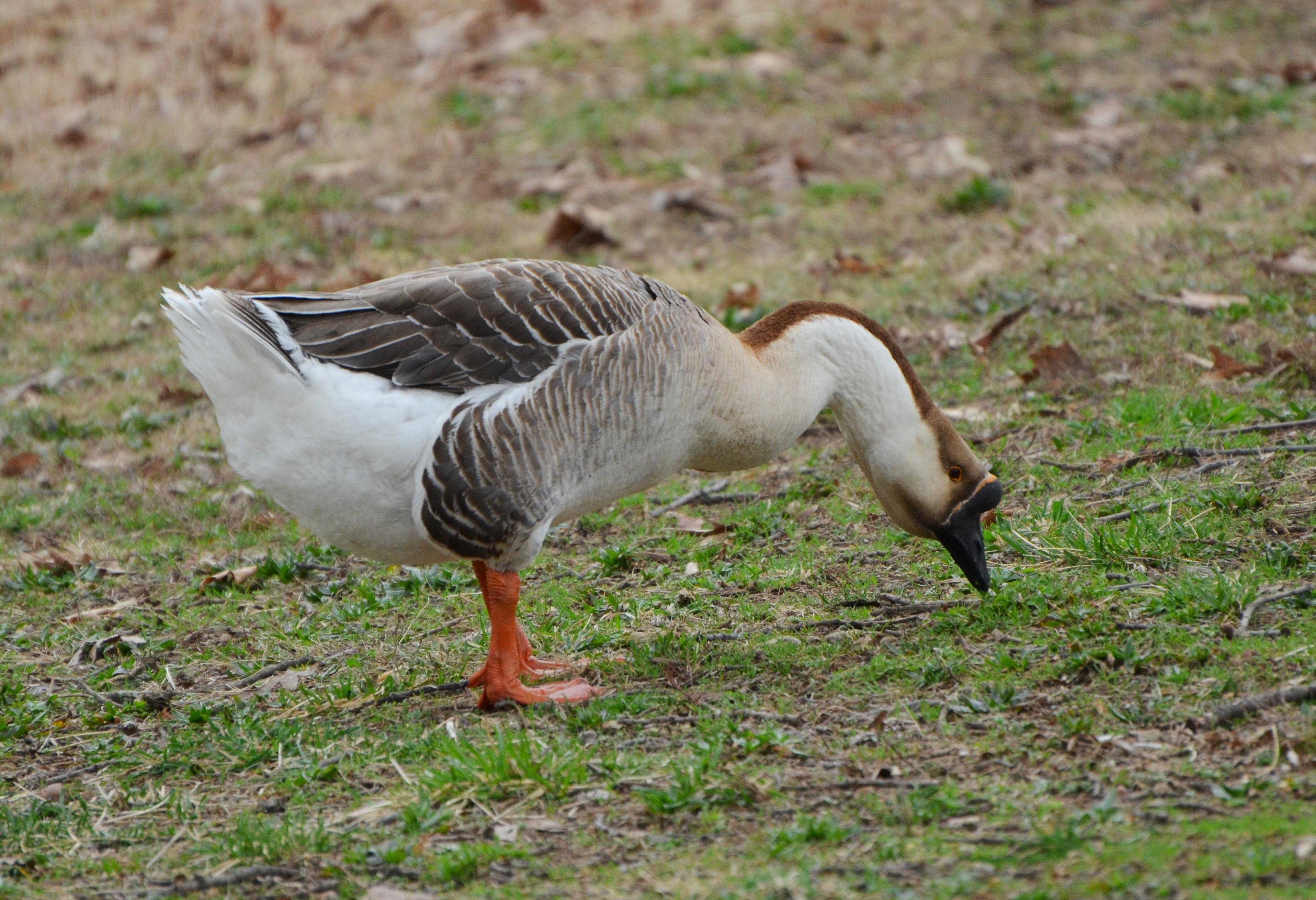 Carondelet Park 3/9/16